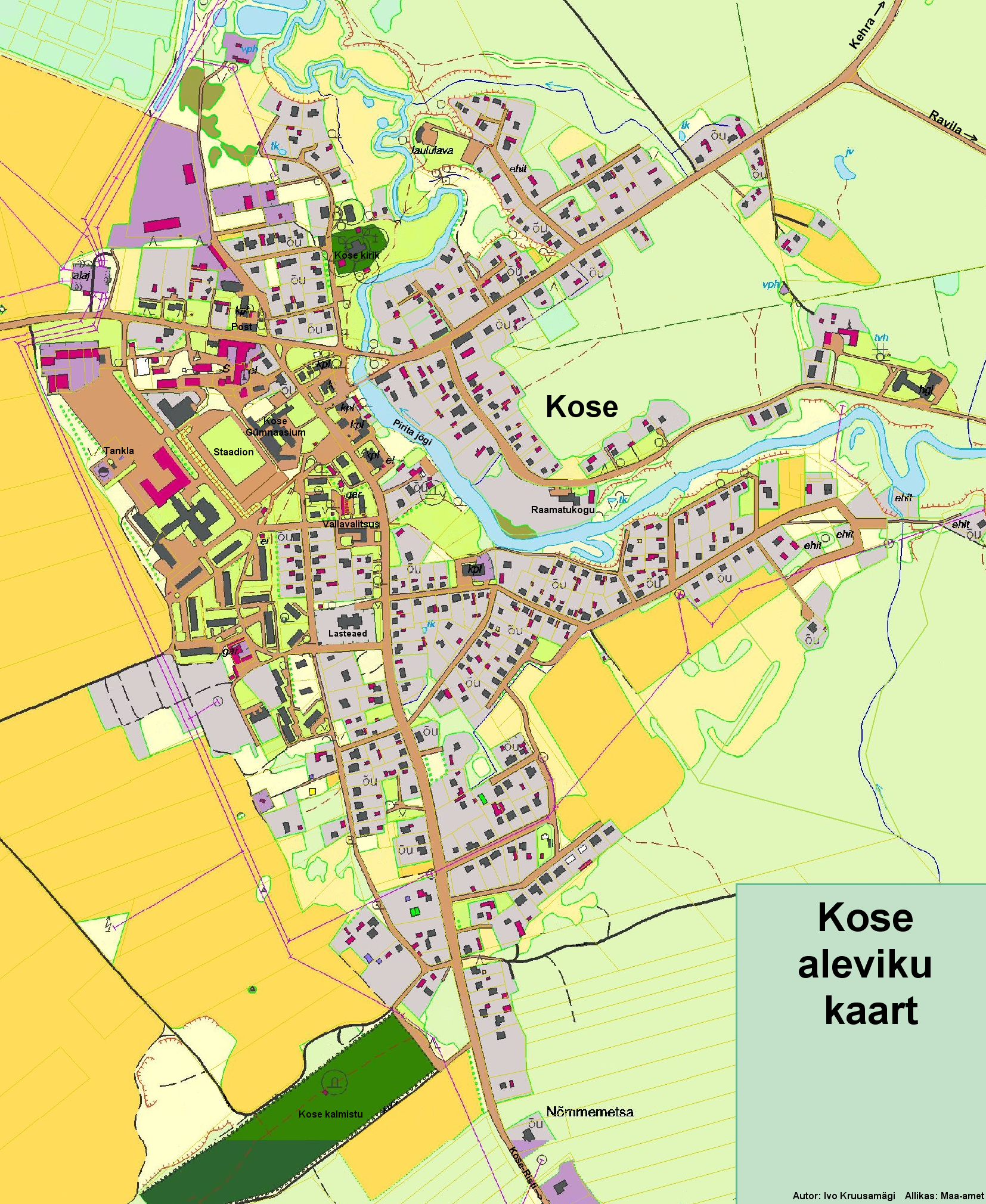 Kaardil on kujutatud Kose alevikku, Kose vallas, Harjumaal. This is the map of Kose in Harju County, Estonia.